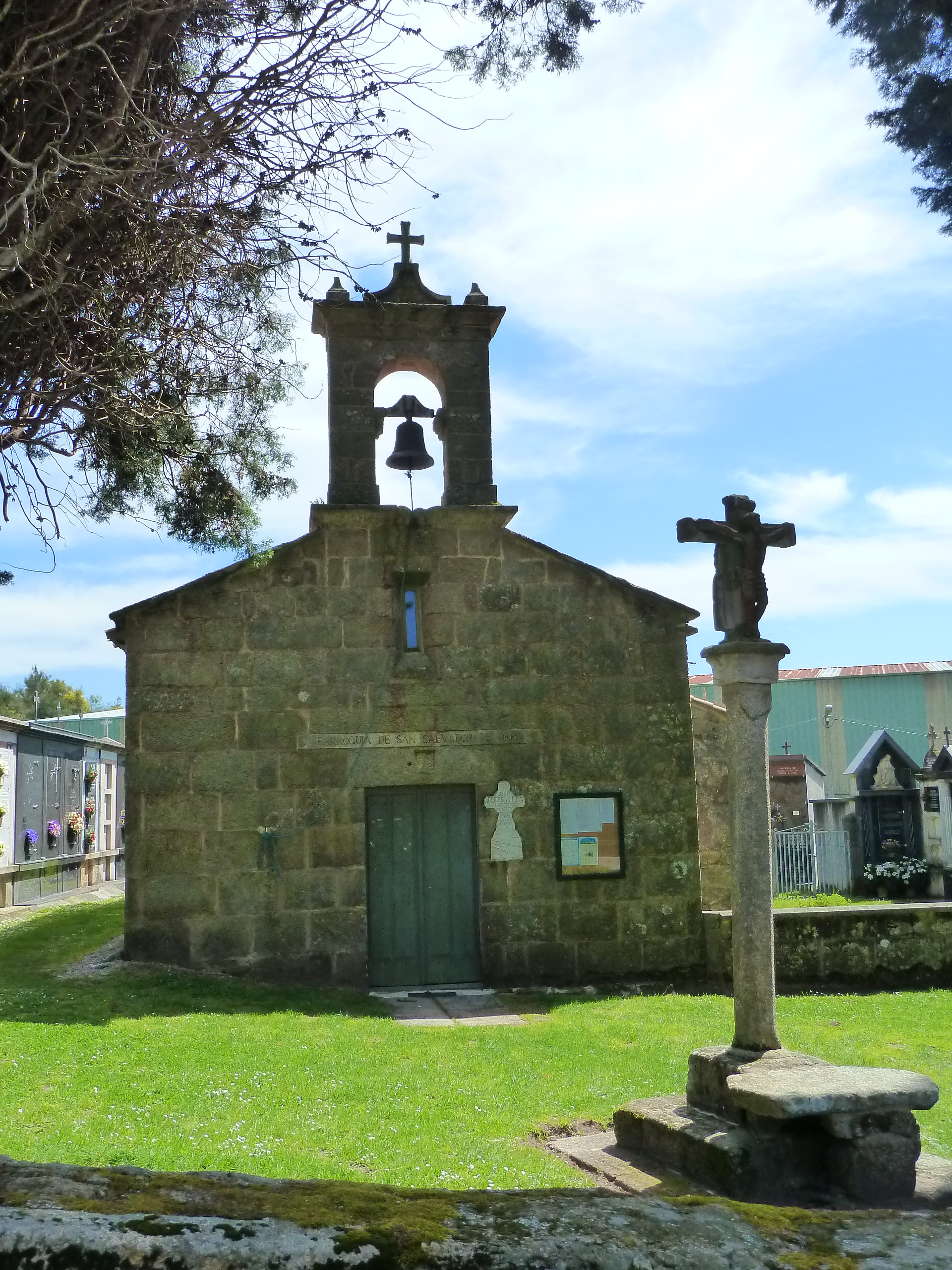 Igrexa de Orro, Culleredo.